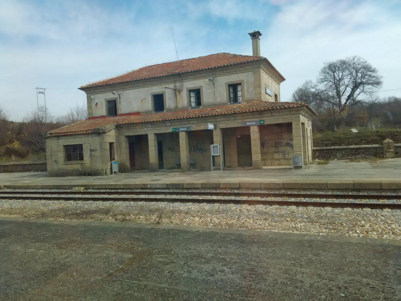 Estación de Pedralba. Línea Zamora-Coruña